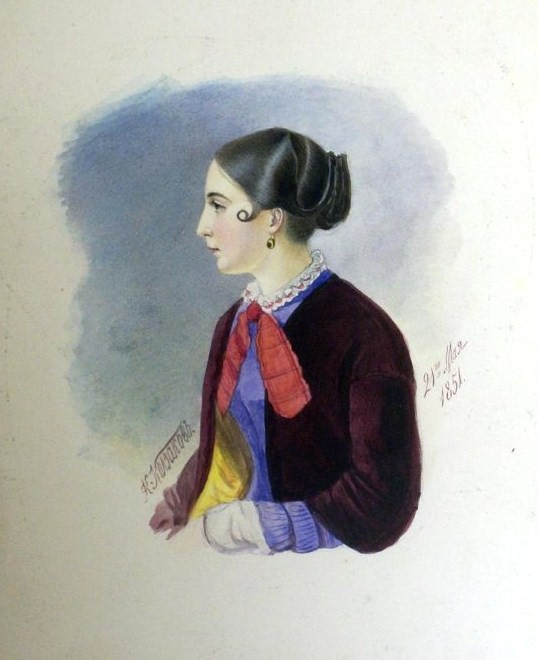 Мария Яковлевна Колзакова, ур. Гилленшмидт (1832—1879)